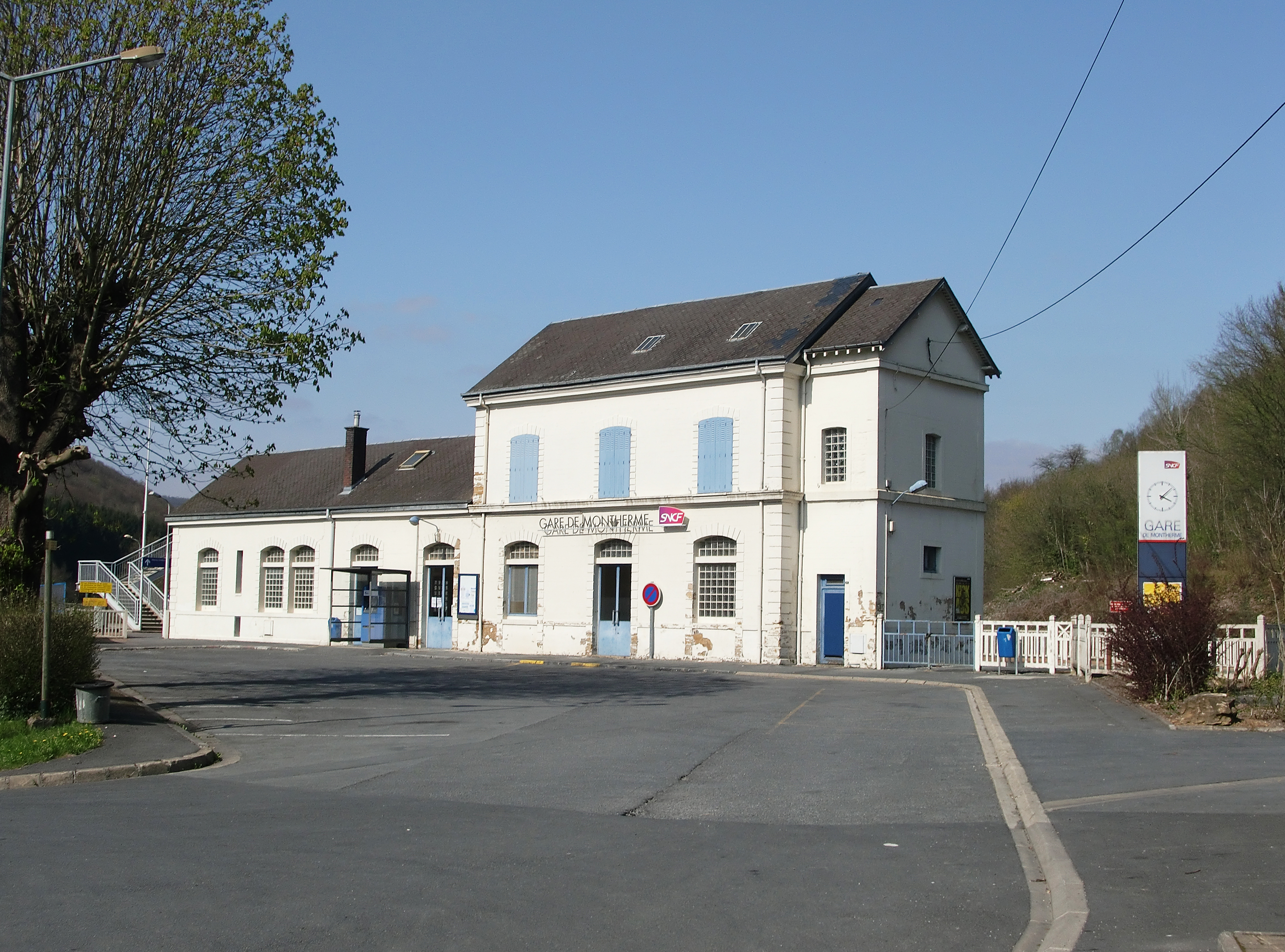 La gare de Monthermé